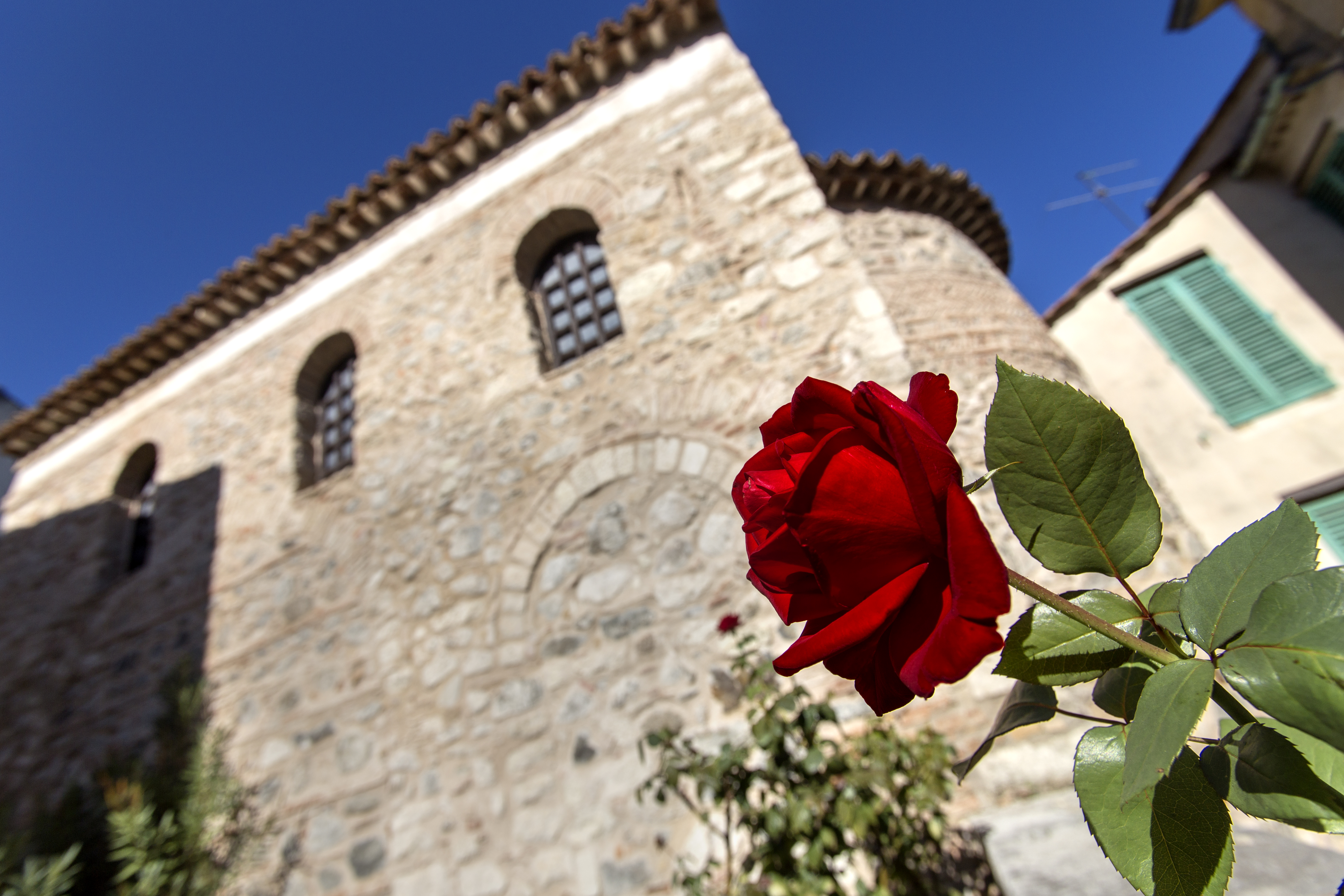 Chiesetta bizantina della Panaghia, Rossano - centro storico This is a photo of a monument which is part of cultural heritage of Italy.